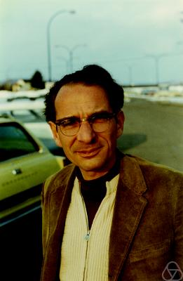 Foto di Frank Spitzer